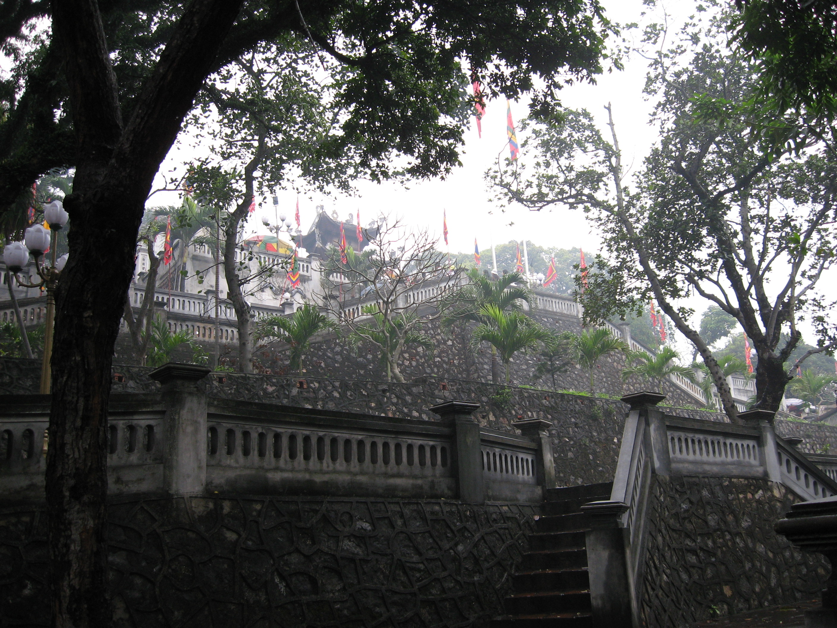 Đền Cửa Ông temple, Cẩm Phả city